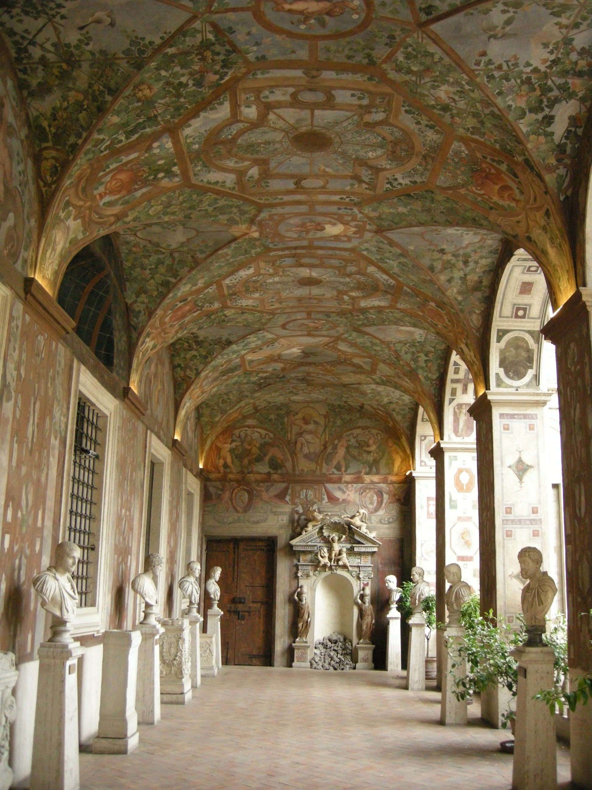 Palazzo altemps, loggetta